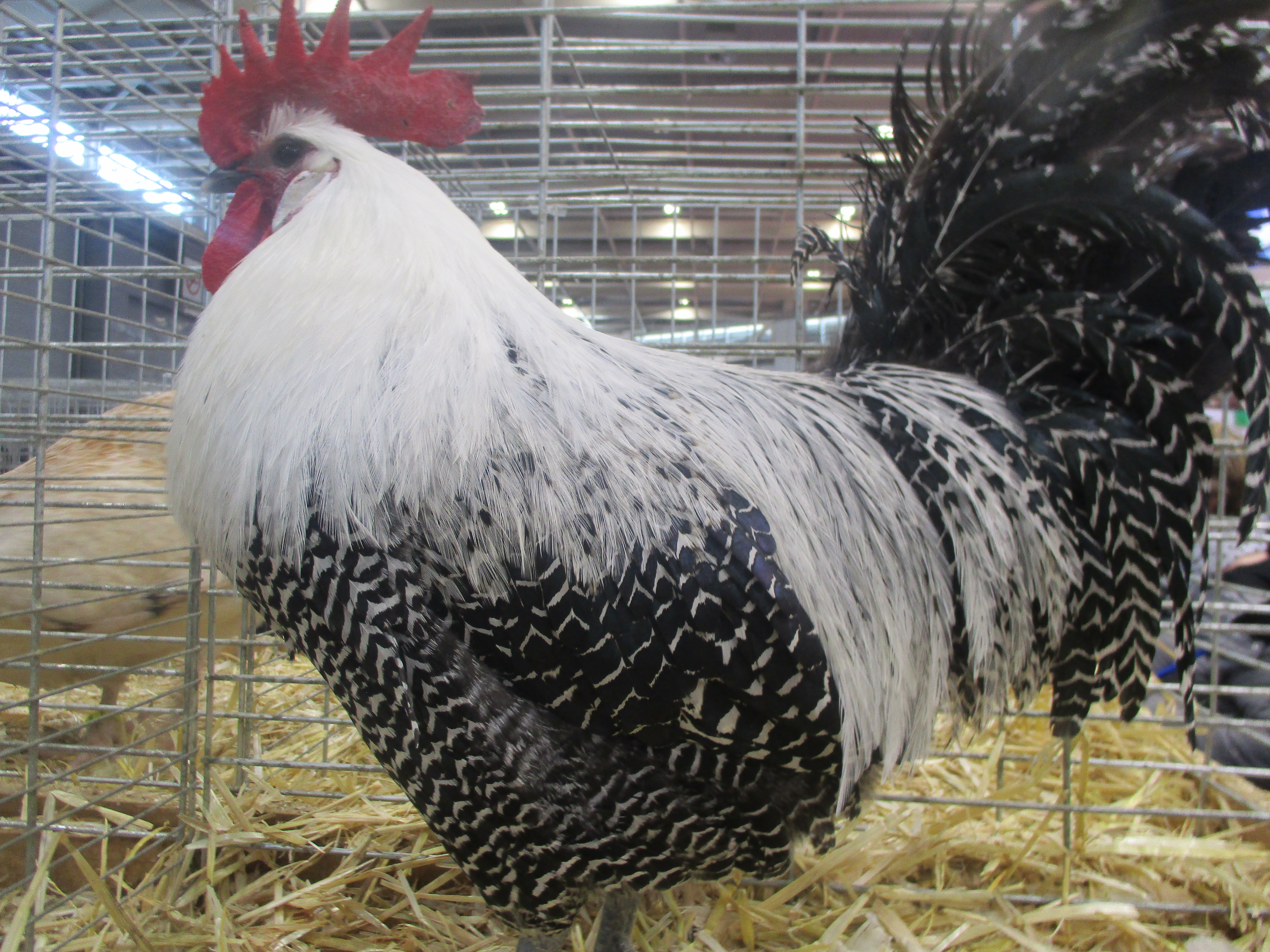 Coq braekel argenté.